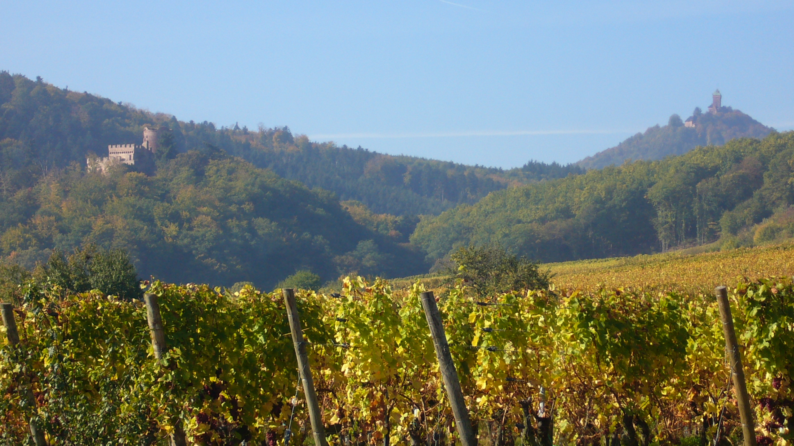 Vue sur les châteaux de Kintzheim et du Haut-Koenigsbourg depuis les vignes